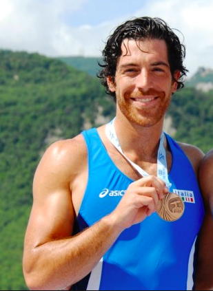 Stefanini Matteo